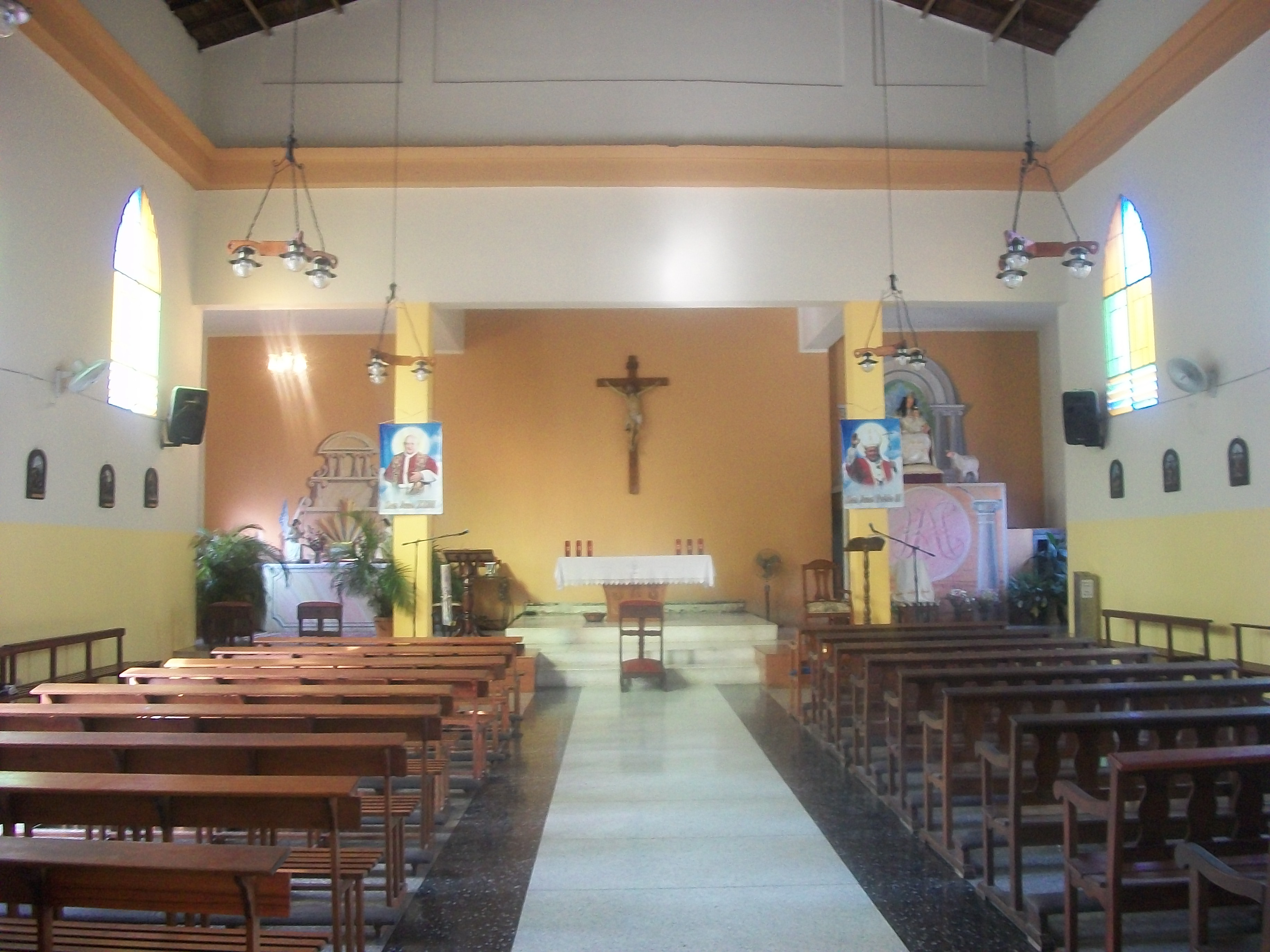 templo donde se rinde reverencia al santo patrón